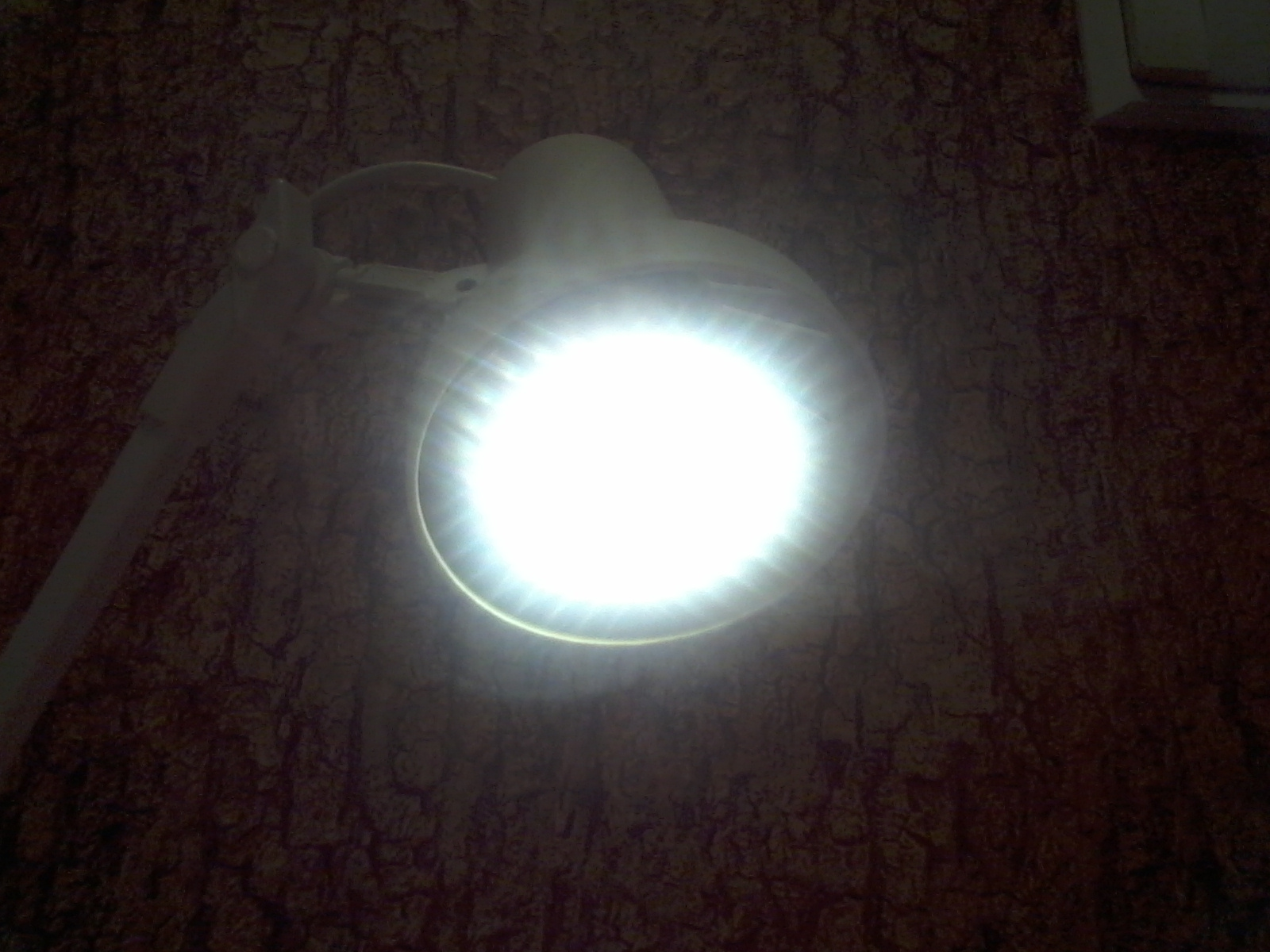 Знято мобілкою Самсунг